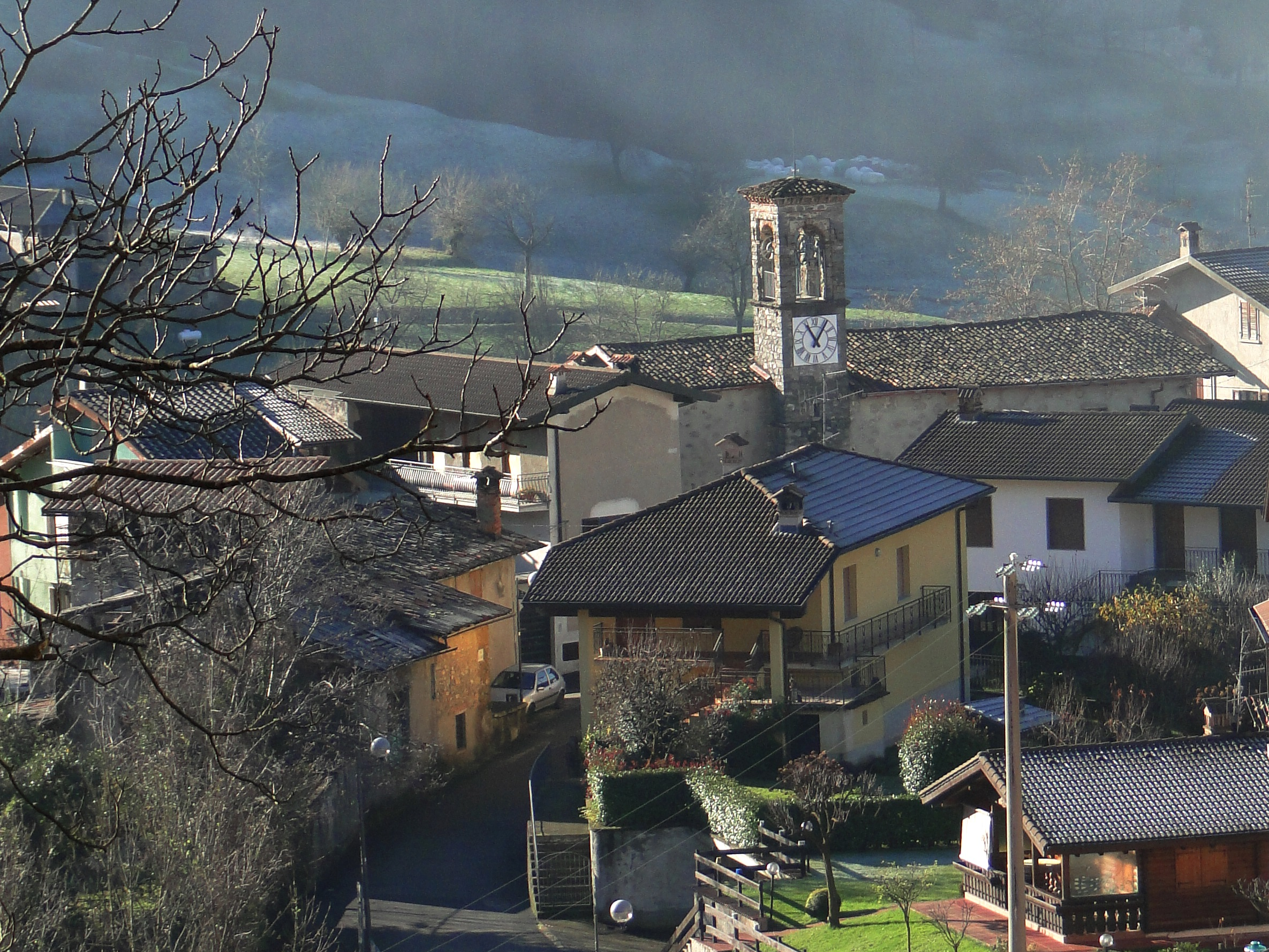 Contrada Cà Bosio e chiesa di santa Lucia. Peia (BG). Italy